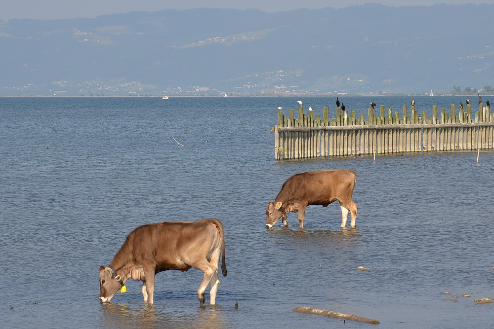 Rinder und Kormorane am Rheinspitz im Naturschutzgebiet Rheindelta, Vorarlberg, Bodensee